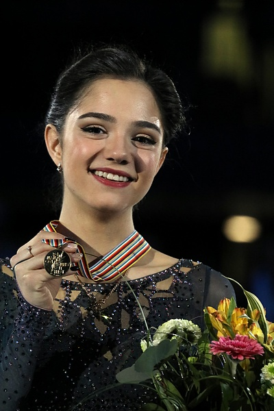 Евгения Медведева на церемонии награждения чемпионата Европы 2017